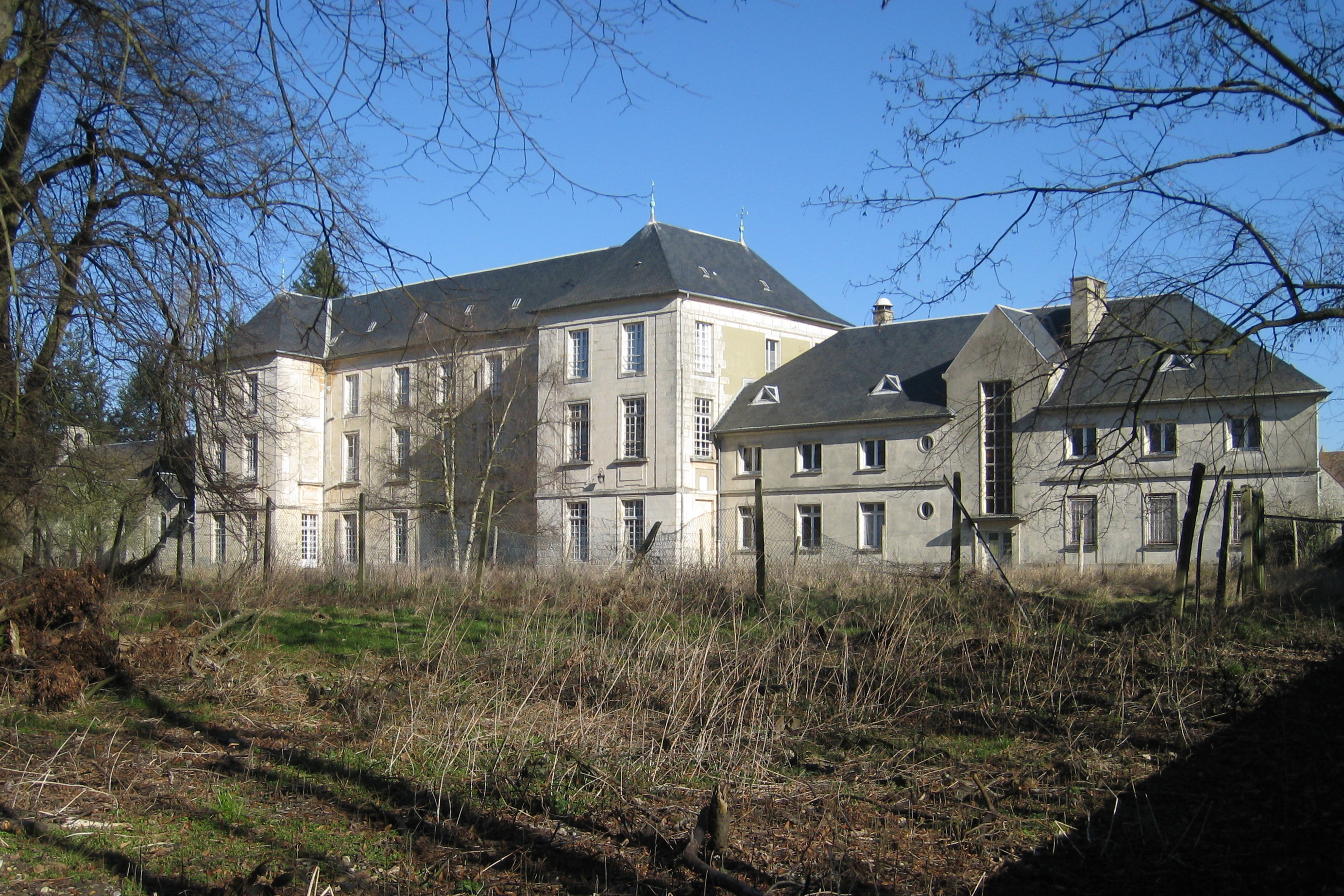 Chateau de Lavilletertre, façade ouest, Oise, France